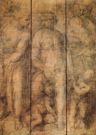 Dibujo de Miguel Ángel Buonarroti c. 1550-53- Museo Británico de Londres. Composición en paralelas